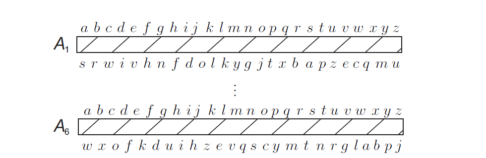 Metoda rusztu